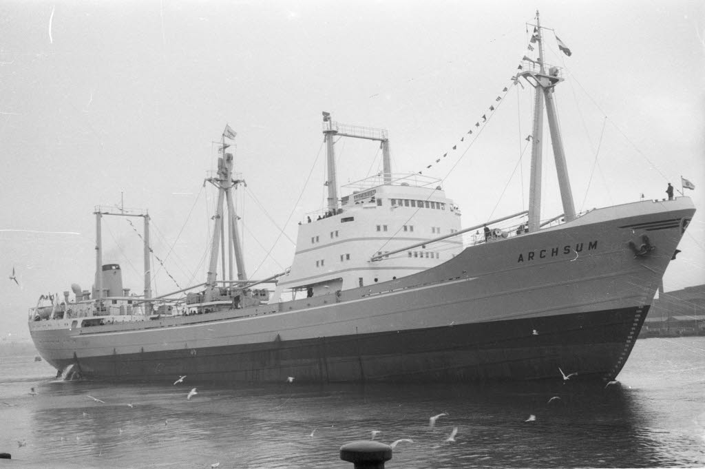 in der Schwentinemündung.